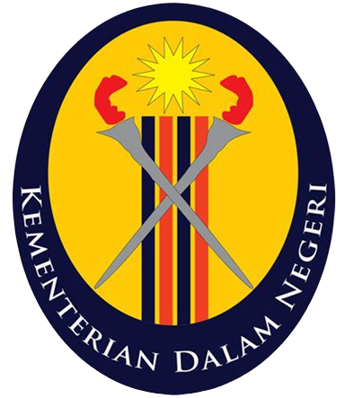 Logo Kementerian Dalam Negeri Malaysia